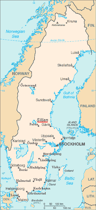 Attempt to place Lake Siljan in Sweden